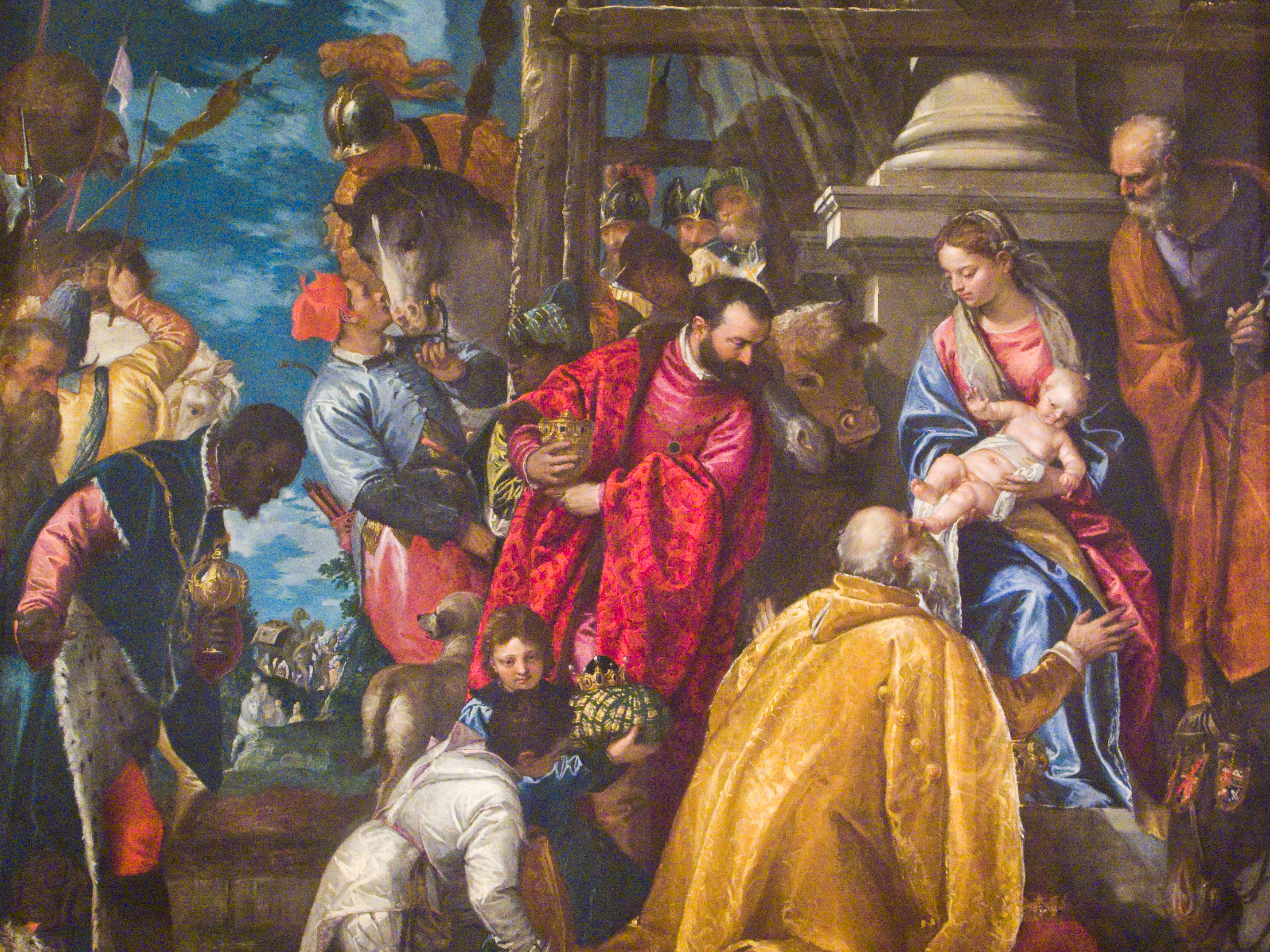 Vicenza - Chiesa di Santa Corona - L'adorazione dei Magi, di Paolo Veronese